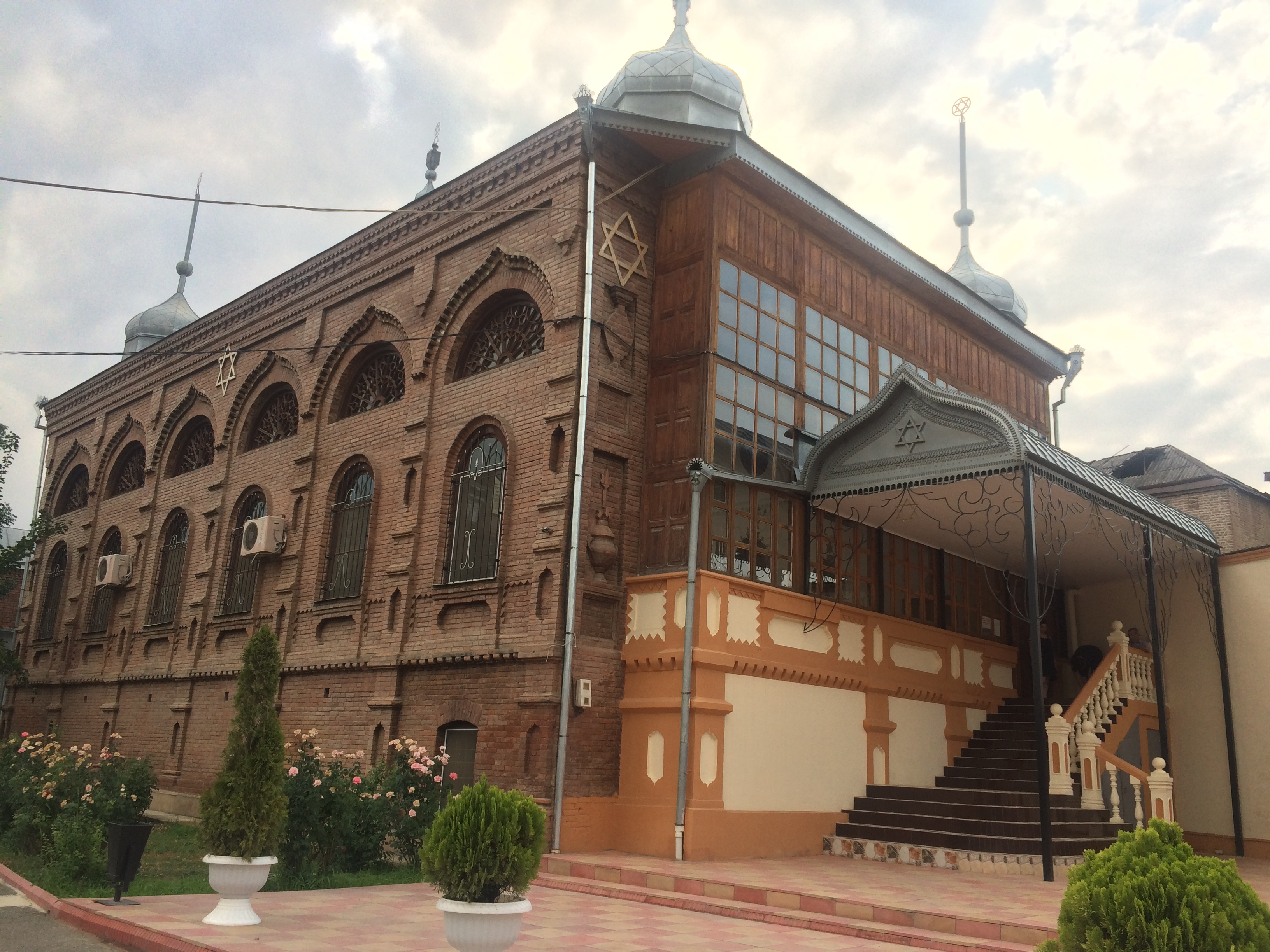 Synagogue à Gouba (Quba)